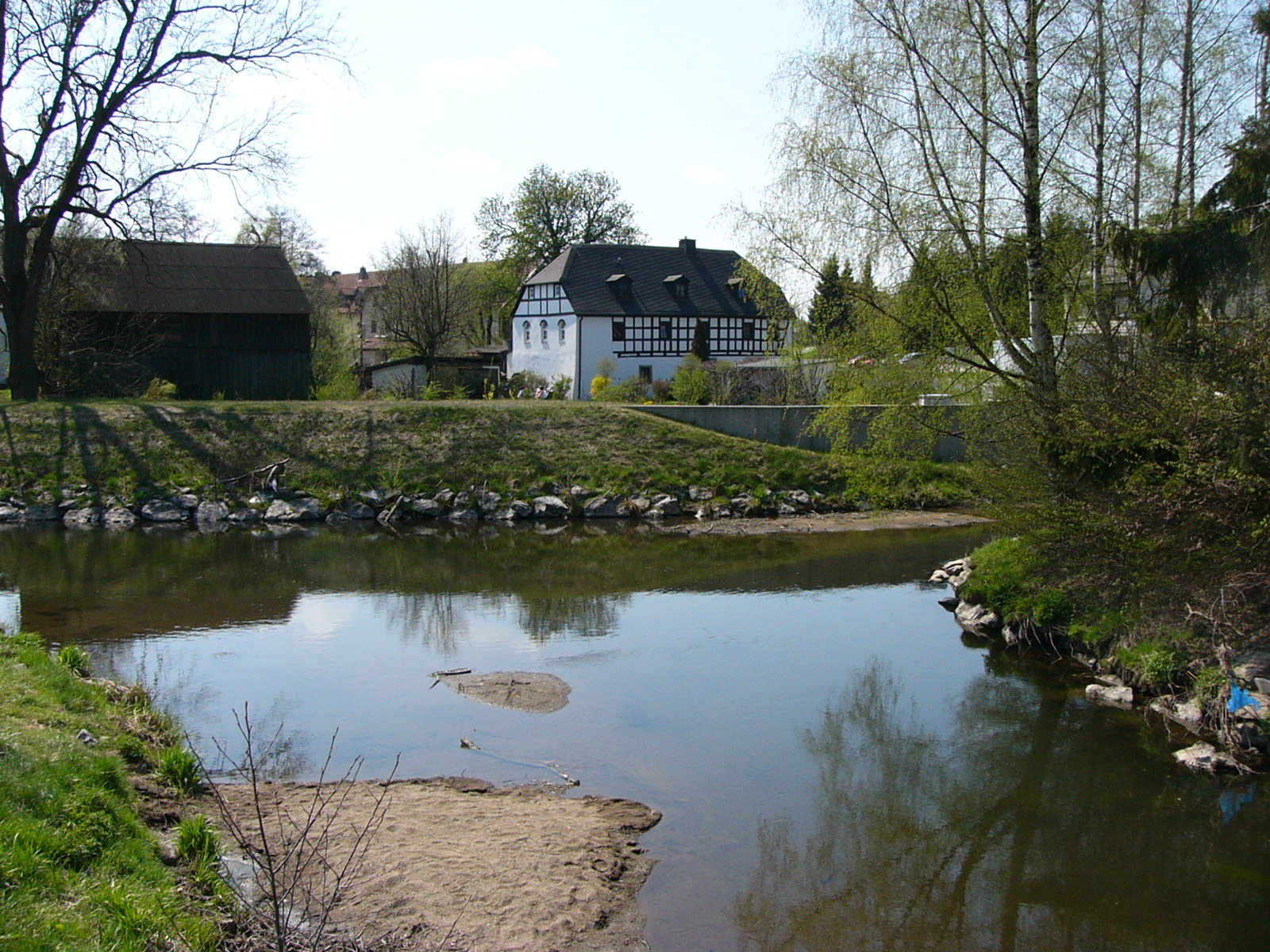 Ansicht von Fattigau